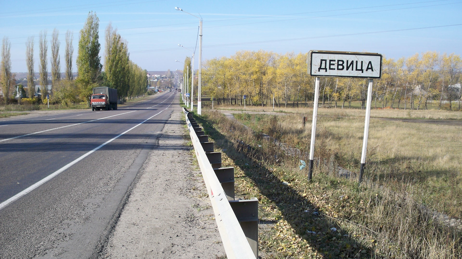 Посёлок Девица, Воронежская область. Дорога А144.